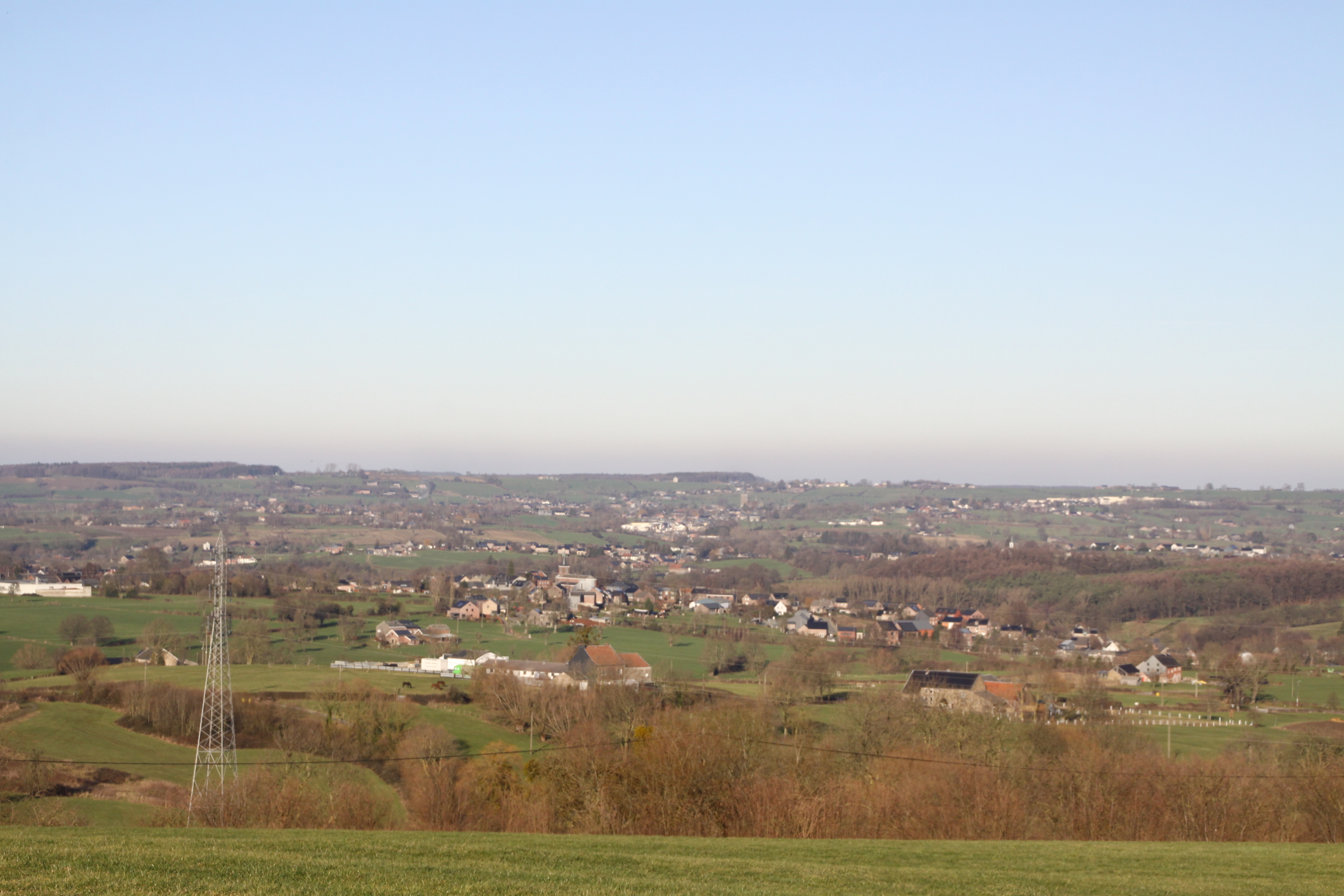 Thimister vum Fort vu Battice aus gesinn